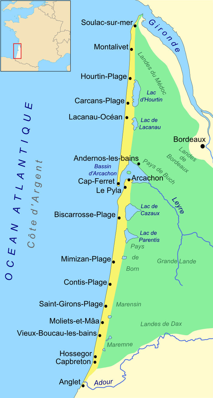 Carte de la Côte d'Argent, Aquitaine, France